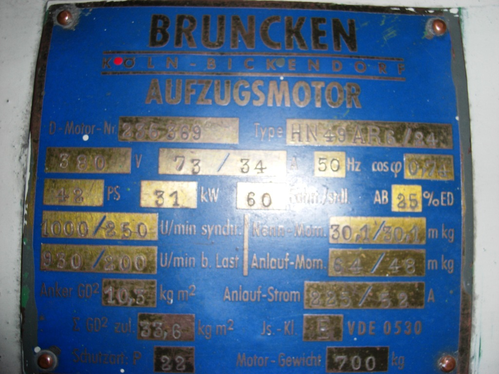 Typenschild von File:Bruncken-motor.jpg